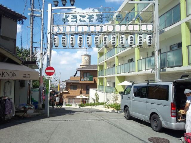 東大阪市石切の街並み